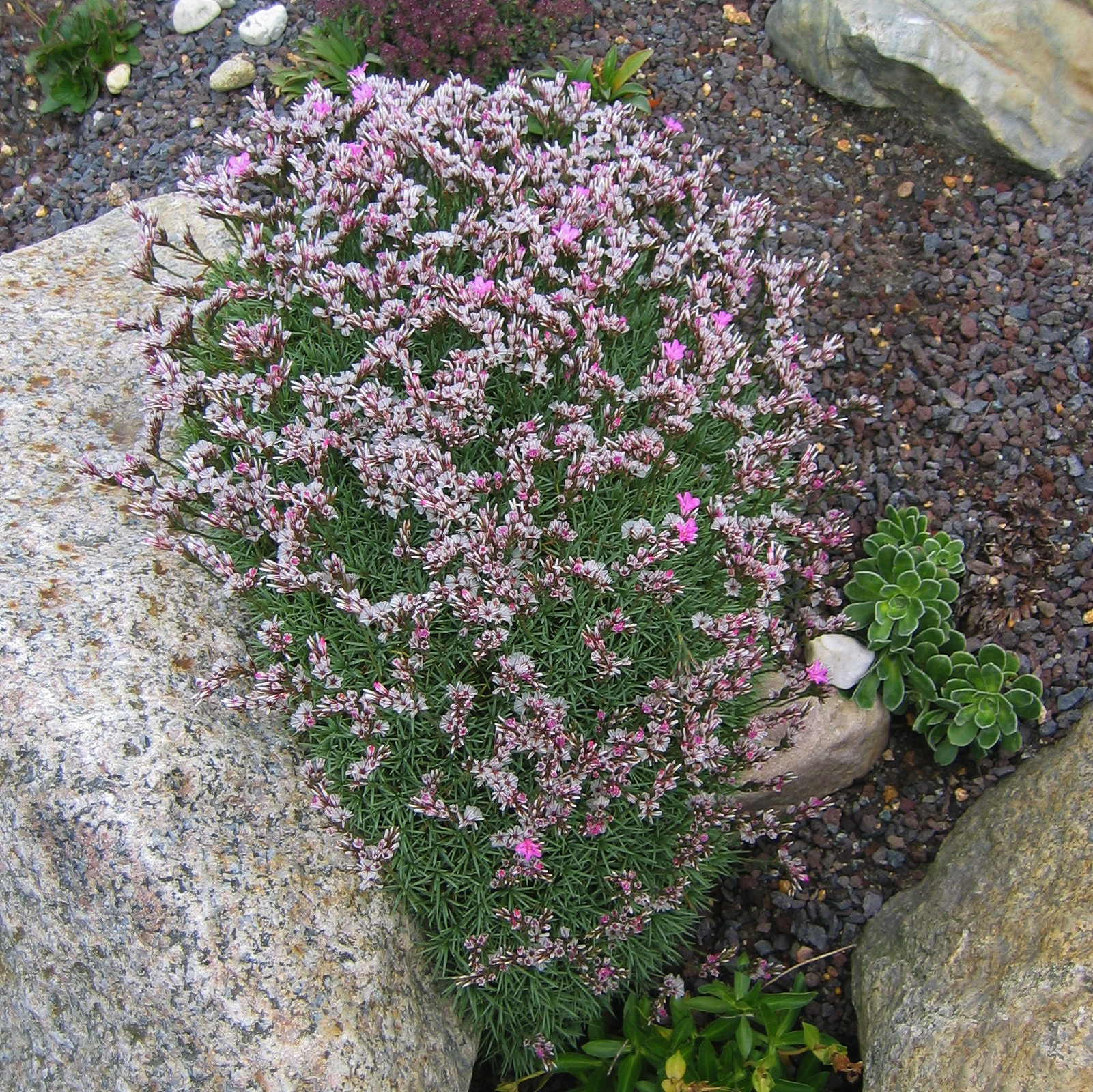 Acantholimon sp. in einem Steingarten in Deutschland; vgl. Wikipedia:Redaktion Biologie/Bestimmung zur Artfrage